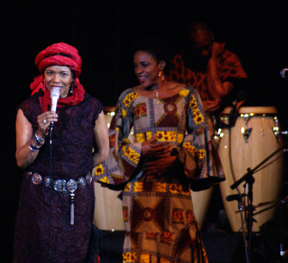 Dee Dee Bridgewater in Catania May 14 2007